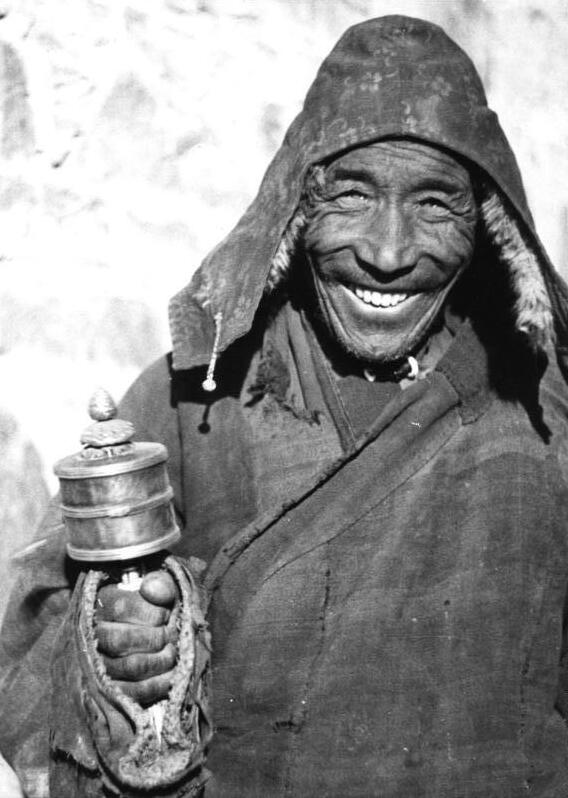 Lhasa, Wanderlama mit Gebetsmühle